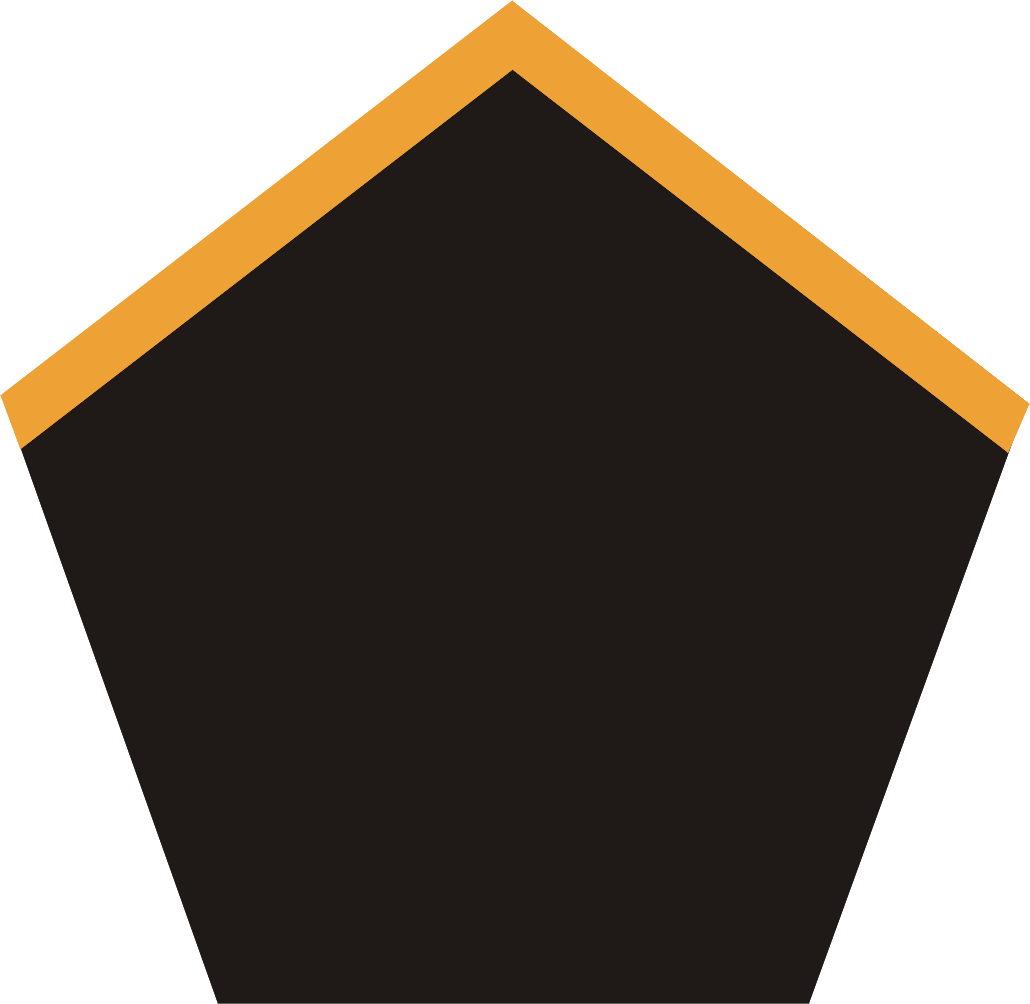 Patka kolumn samochodowych (na kołnierz) wprowadzona w Wojsku Polskim w Anglii w 1941